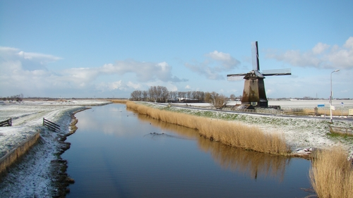 Nedersaksies: Schermerhorn mölle